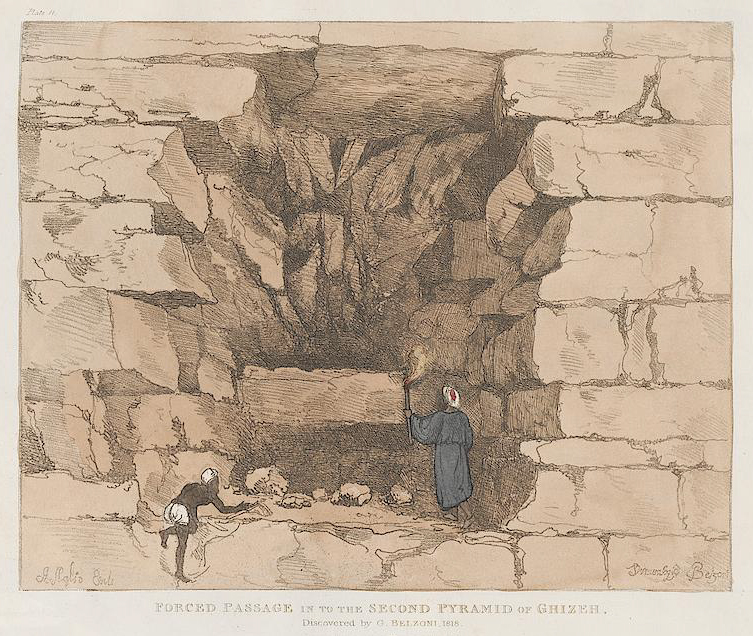 Wtórne wejście do piramidy Chefrena w Gizie odkryte przez G. Belzoniego.